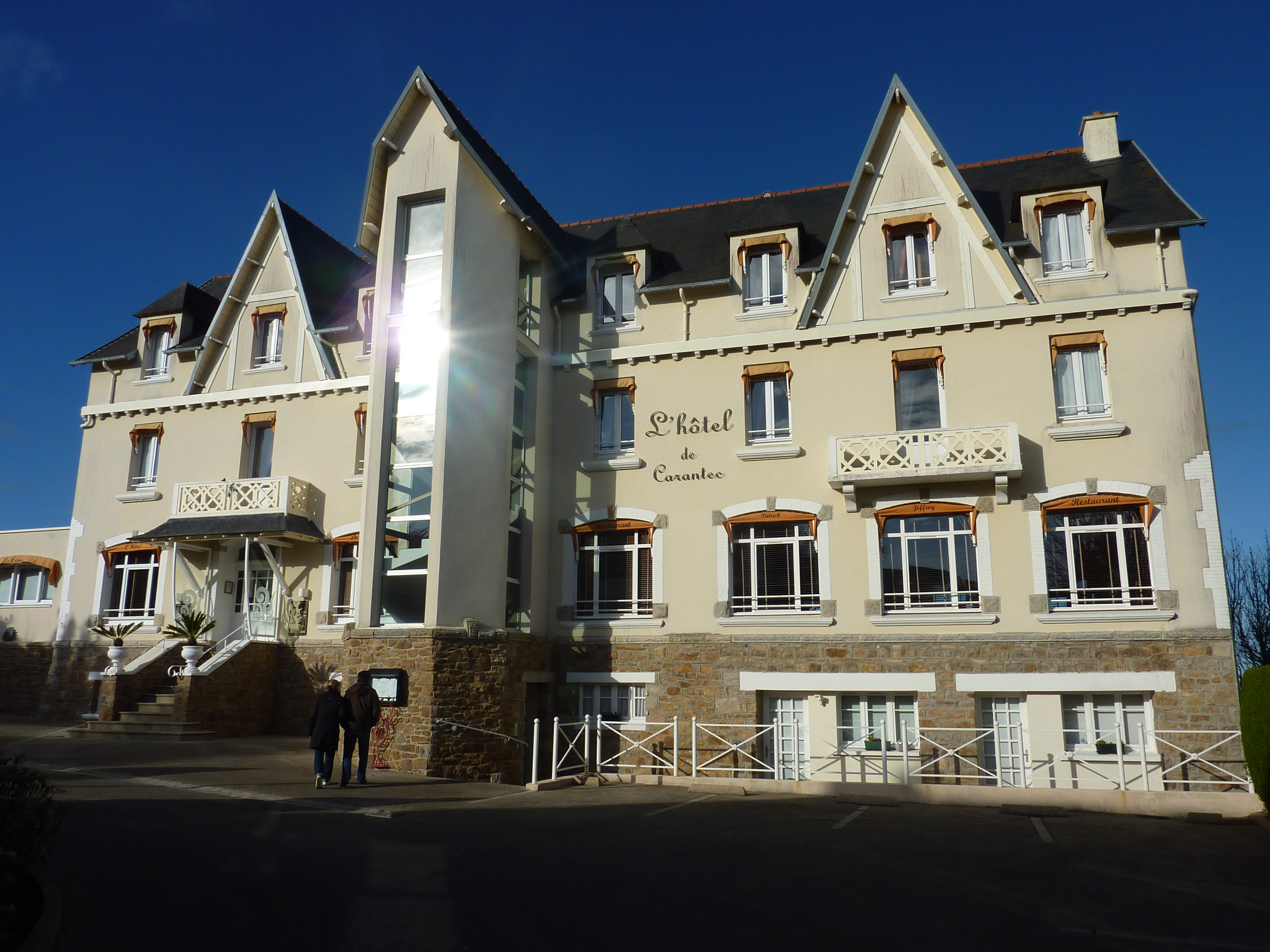 Carantec : l'hôtel Geffroy